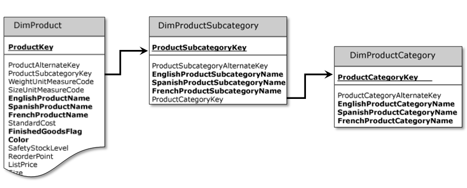 Beispieltabellenstruktur eines Schneeflockenschemas